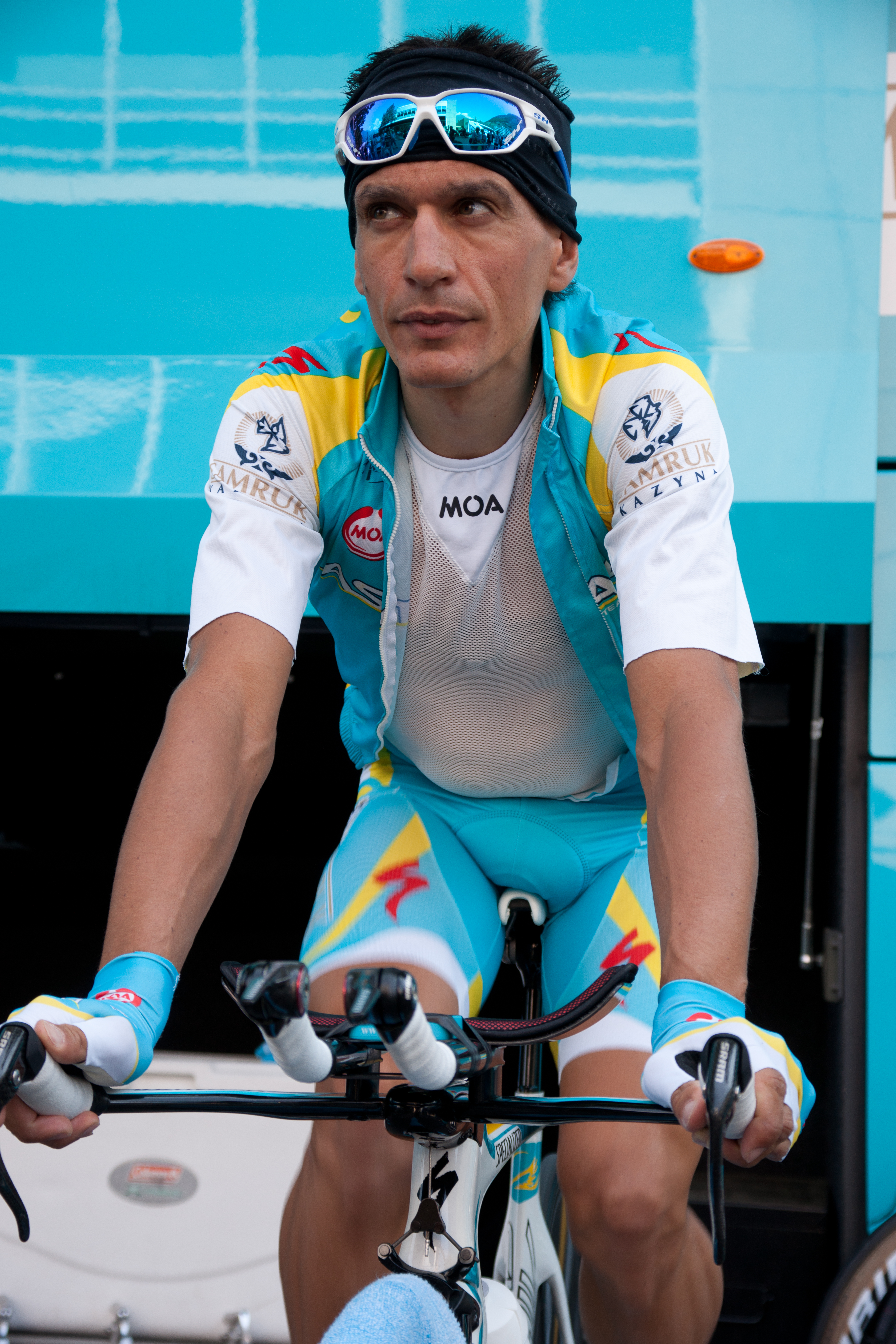 Contre la montre - Romandie 2010